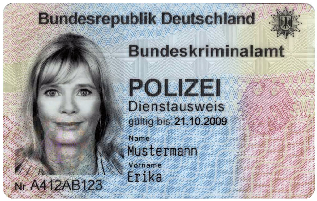 Elektronischer Dienstausweis für deutsche Bundesbehörden (eDA), Polizeidienstausweis, Vorderseite, entwickelt und gefertigt von der Bundesdruckerei